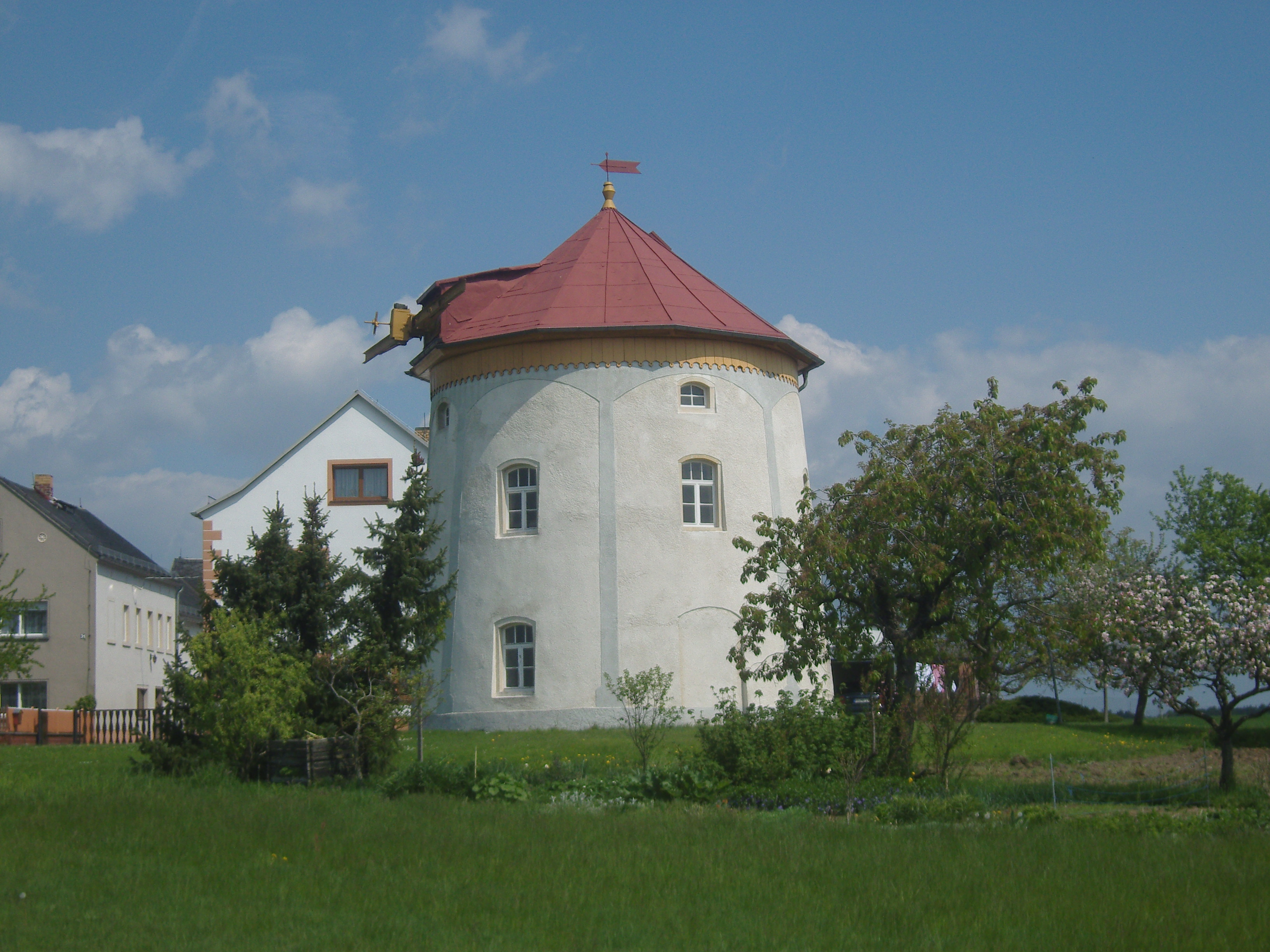 Ehemalige Windmühle in Schönborn im Landkreis Meißen in Sachsen